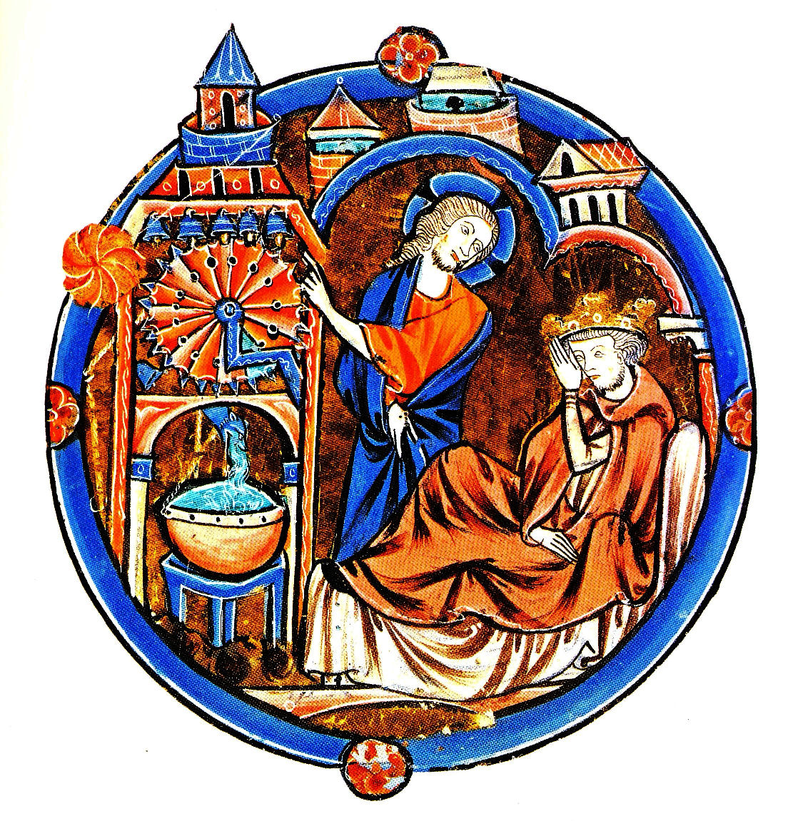 Horloge à eau dans une Bible moralisée française.